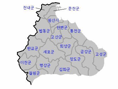 강원도 (북) 행정구역 지도